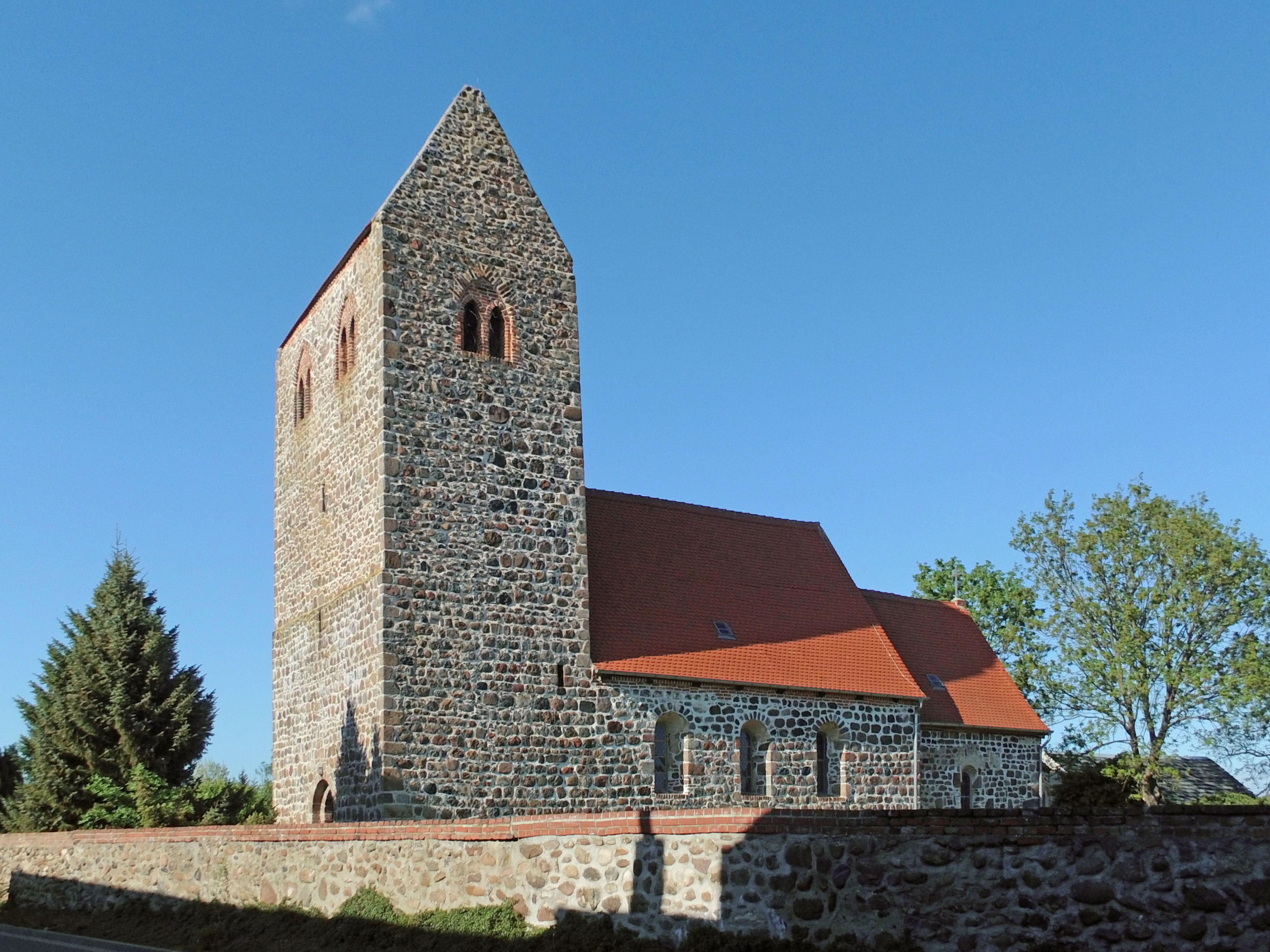 Evangelisch-lutherische Kirche in Bertkow bei Goldbeck.